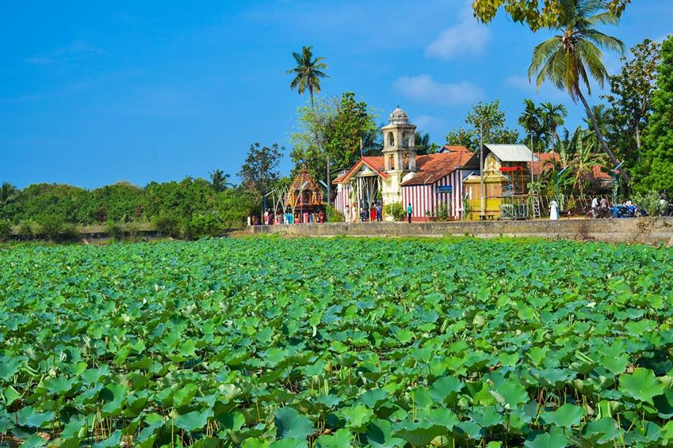 நாயன்மார்கட்டு அரசடிப்பிள்ளையார் ஆலயம் - நாயன்மார்கட்டு குளத்தில் இருந்தான பார்வை